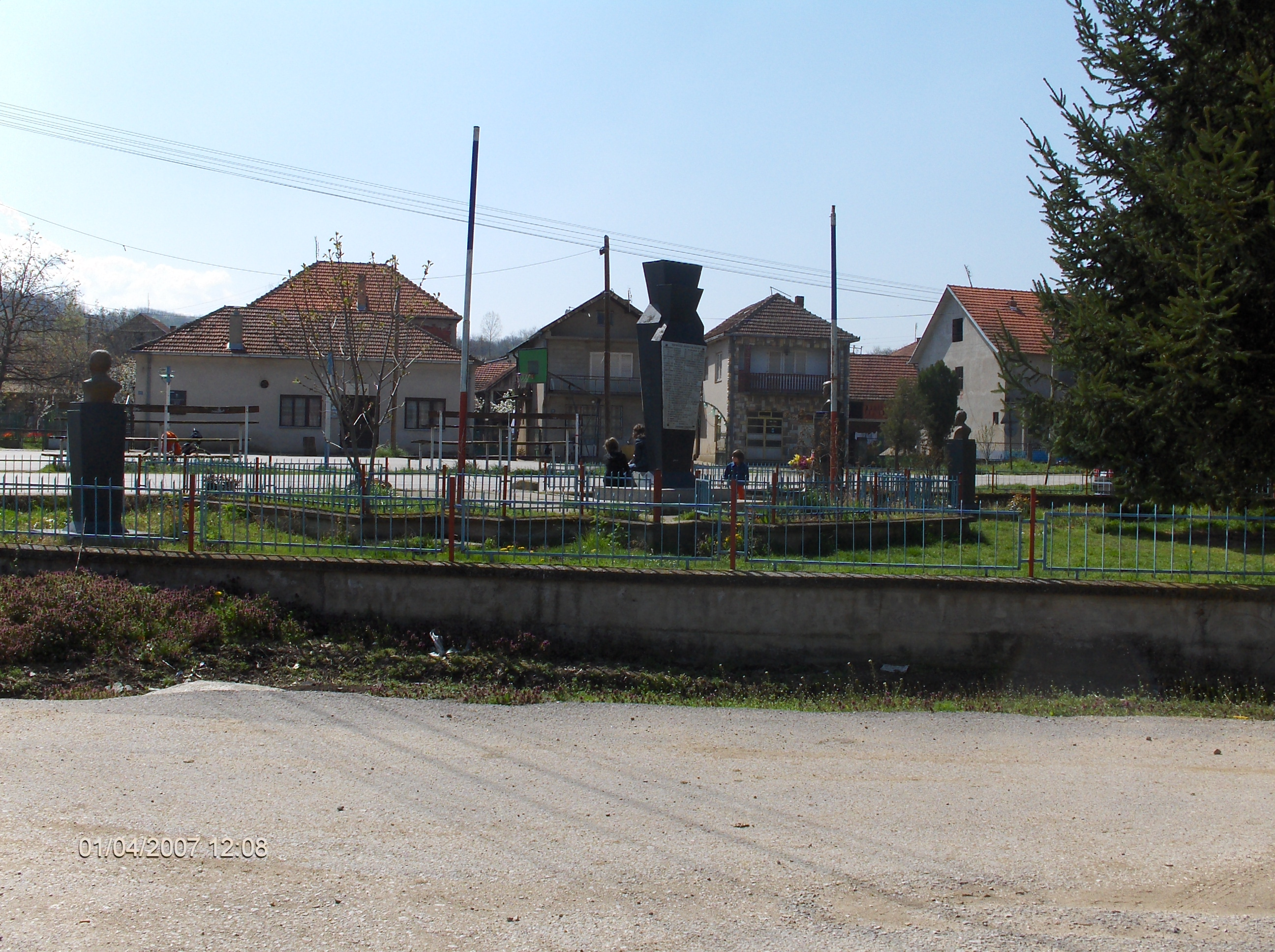 AUTOR DEJAN ILIĆ MATKIN SPOMEN PARK U CENTRU VELIKE GRABOVNICE Spomen obeležje poginulim borcima balkanskih ratova, prvog i drugog svetskog rata, koje su osamdesetih godina prošlog veka podigli Velikograbovničani.